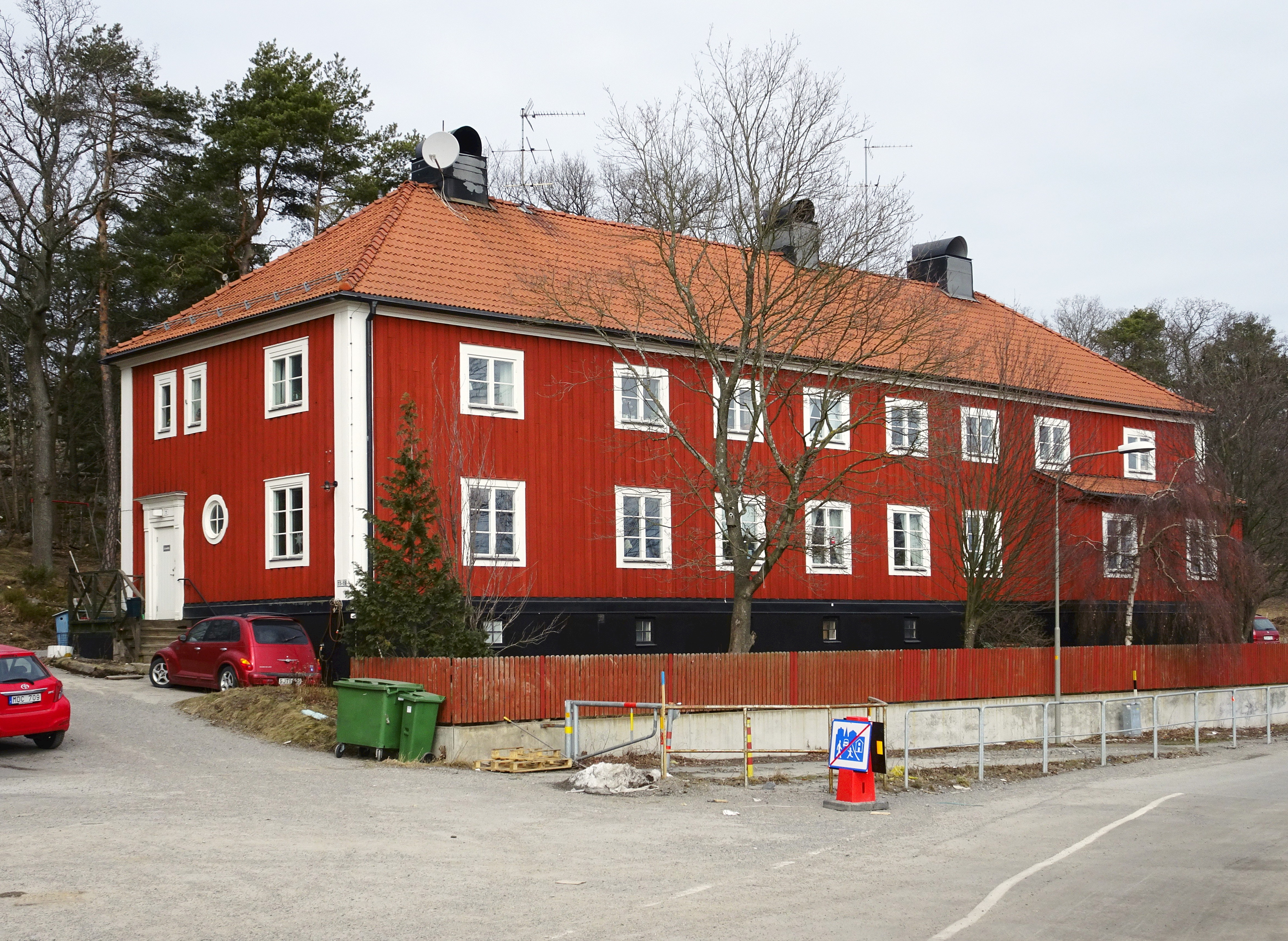 Årsta gårds arbetarlänga, Årstaskogs väg 15, uppförd för Årsta gård 1905-1915 med 10 bostäder.